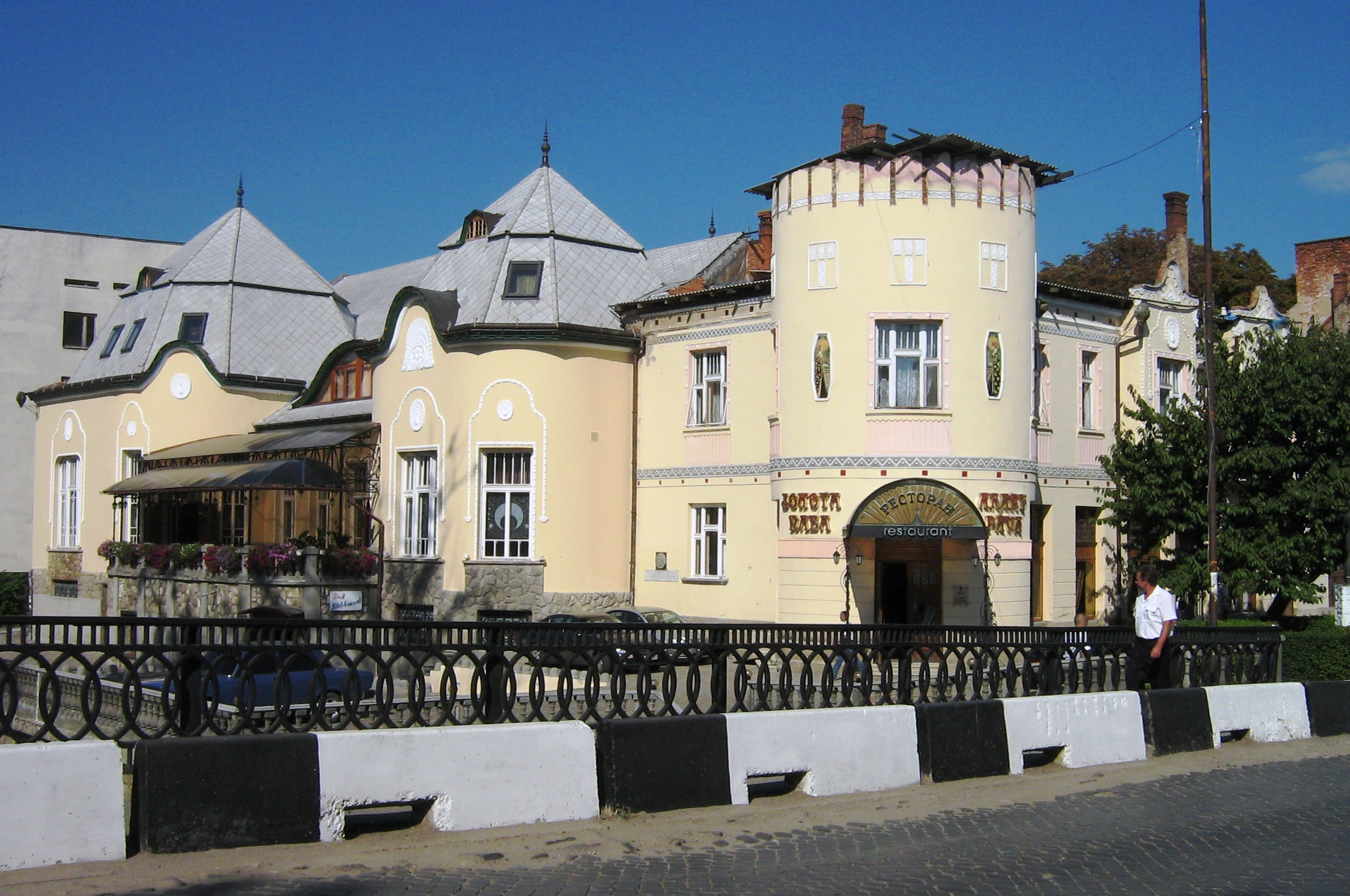 A beregszászi Arany Páva étterem, egykori Úri Kaszinó épülete, Kárpátalja. A tető 2005. június 27-én égett le, azóta sincs helyreállítva